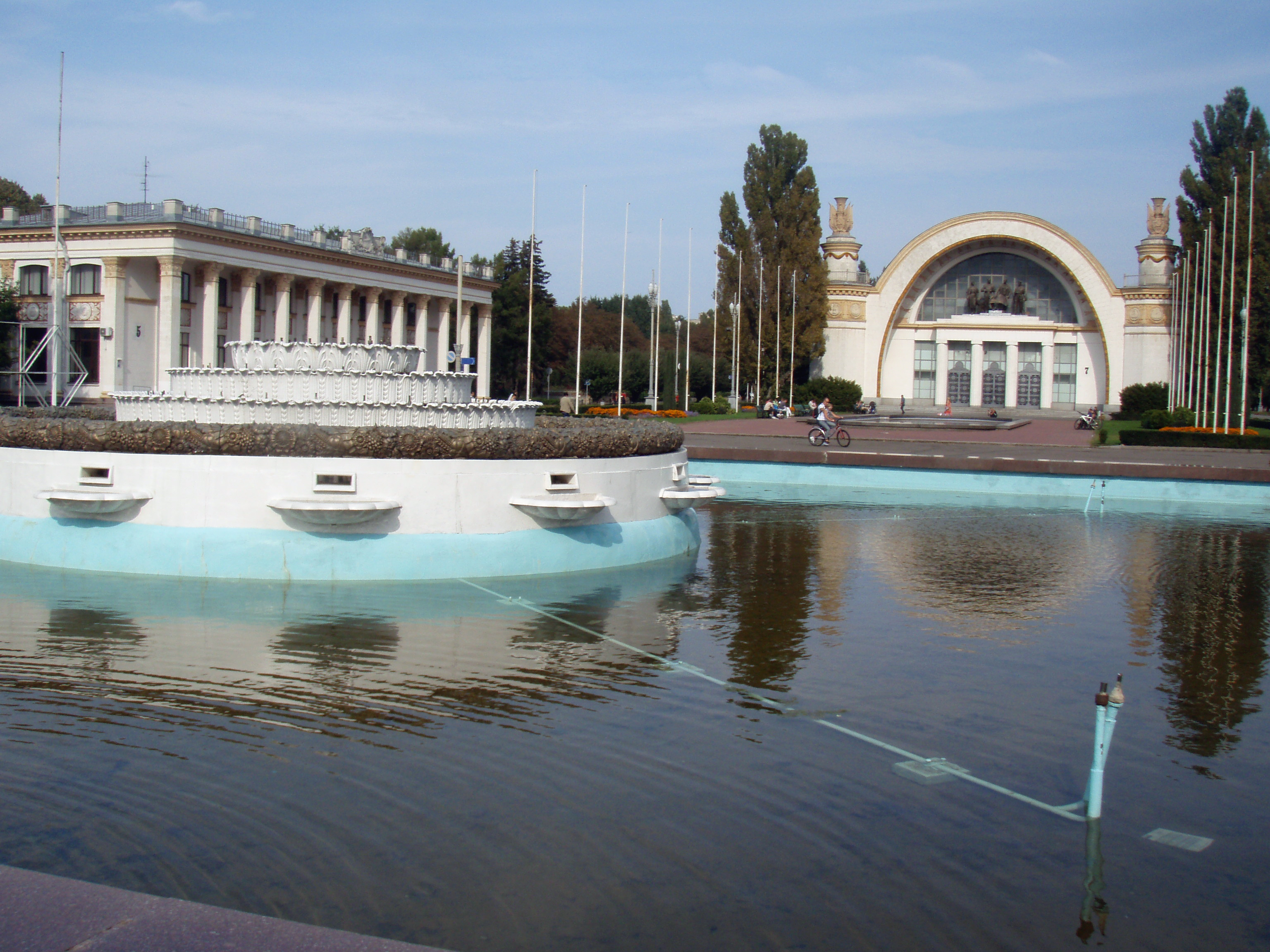 Україна, Київ - Виставка досягнень народного господарства УРСР - Головний фонтан